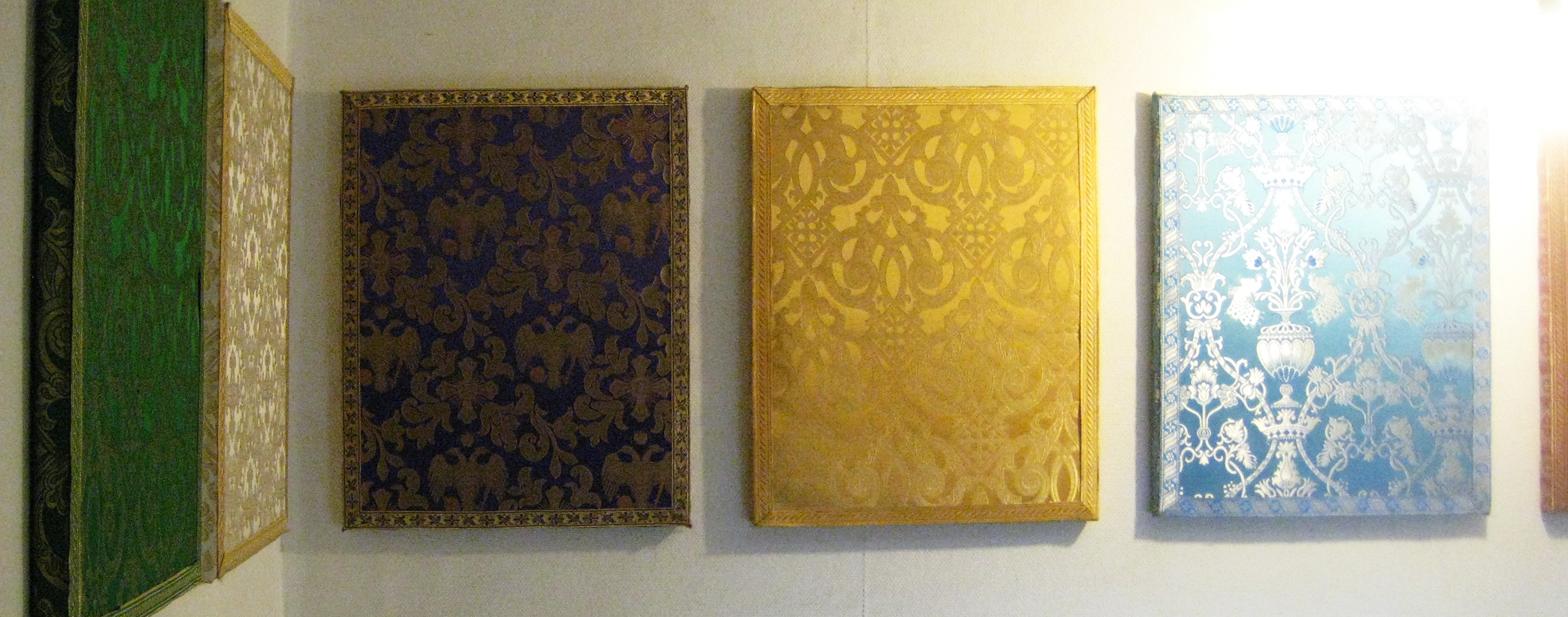 textile